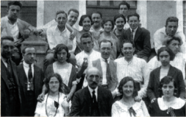 Toribio Altzaga eta bere taldea